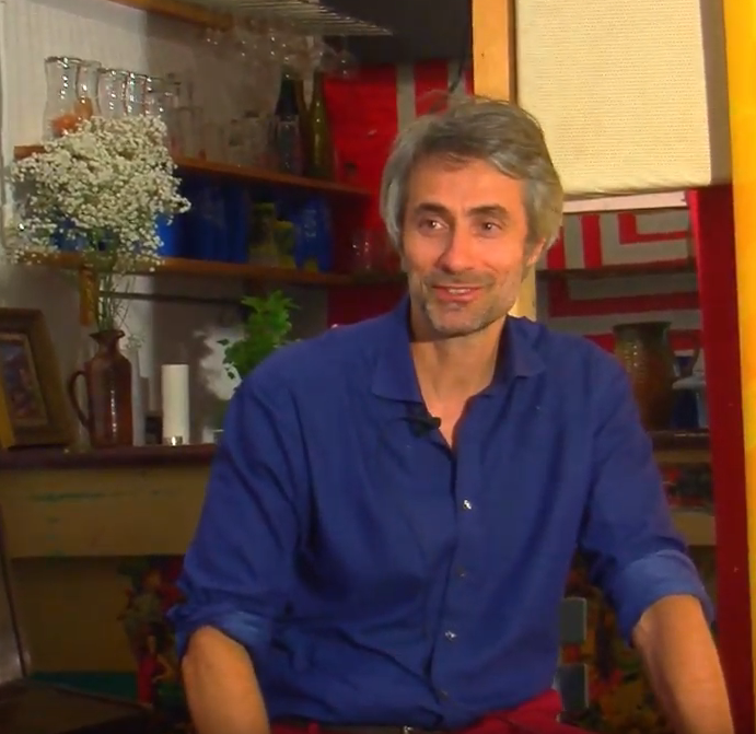 Raphaël Liogier, Le besoin de métaphysique, Université Populaire Marseille métropole